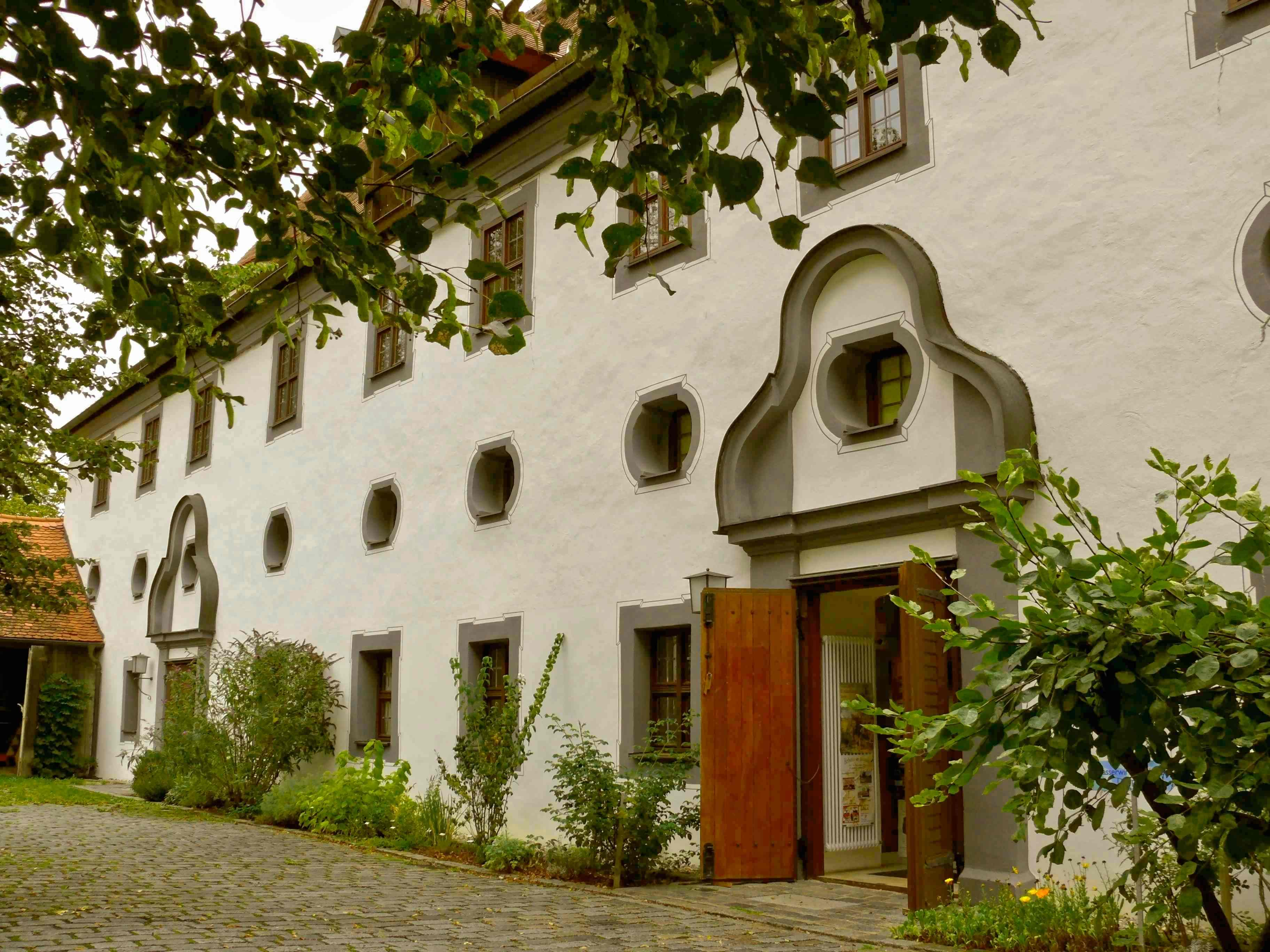 Museumsgebäude maihingen